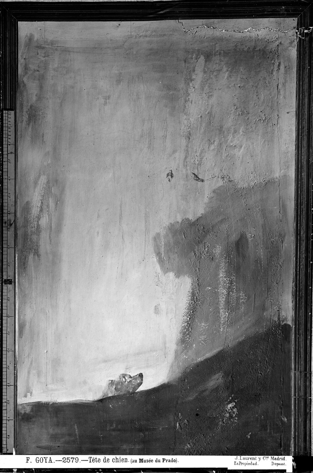 Fotografía realizada por J. Laurent en 1874, de la pintura Perro semihundido de Francisco de Goya, antes de su arranque y traslado a lienzo. Estaba en un muro del primer piso (planta alta) de la casa de la Quinta del Sordo, o Quinta de Goya. El negativo de vidrio original se conserva en el Archivo Ruiz Vernacci, del Instituto del Patrimonio Cultural de España, en Madrid.